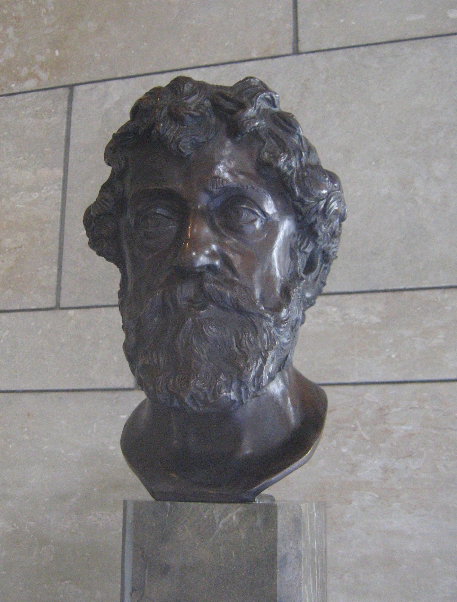 Adolf von Hildebrand: Der Bildhauer Josef Floßmann, 1907-08